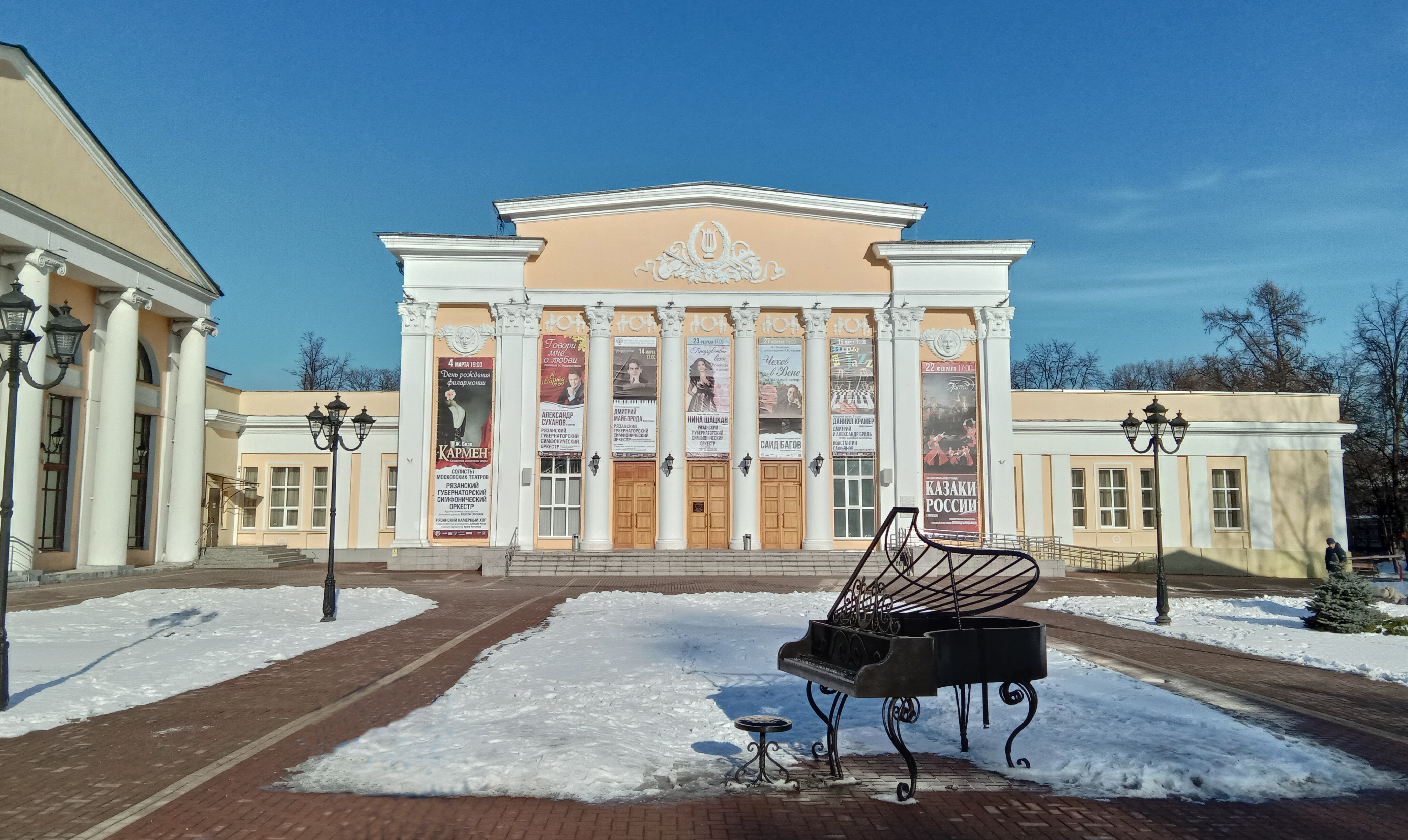 Театр имени Сергея Есенина в Рязани